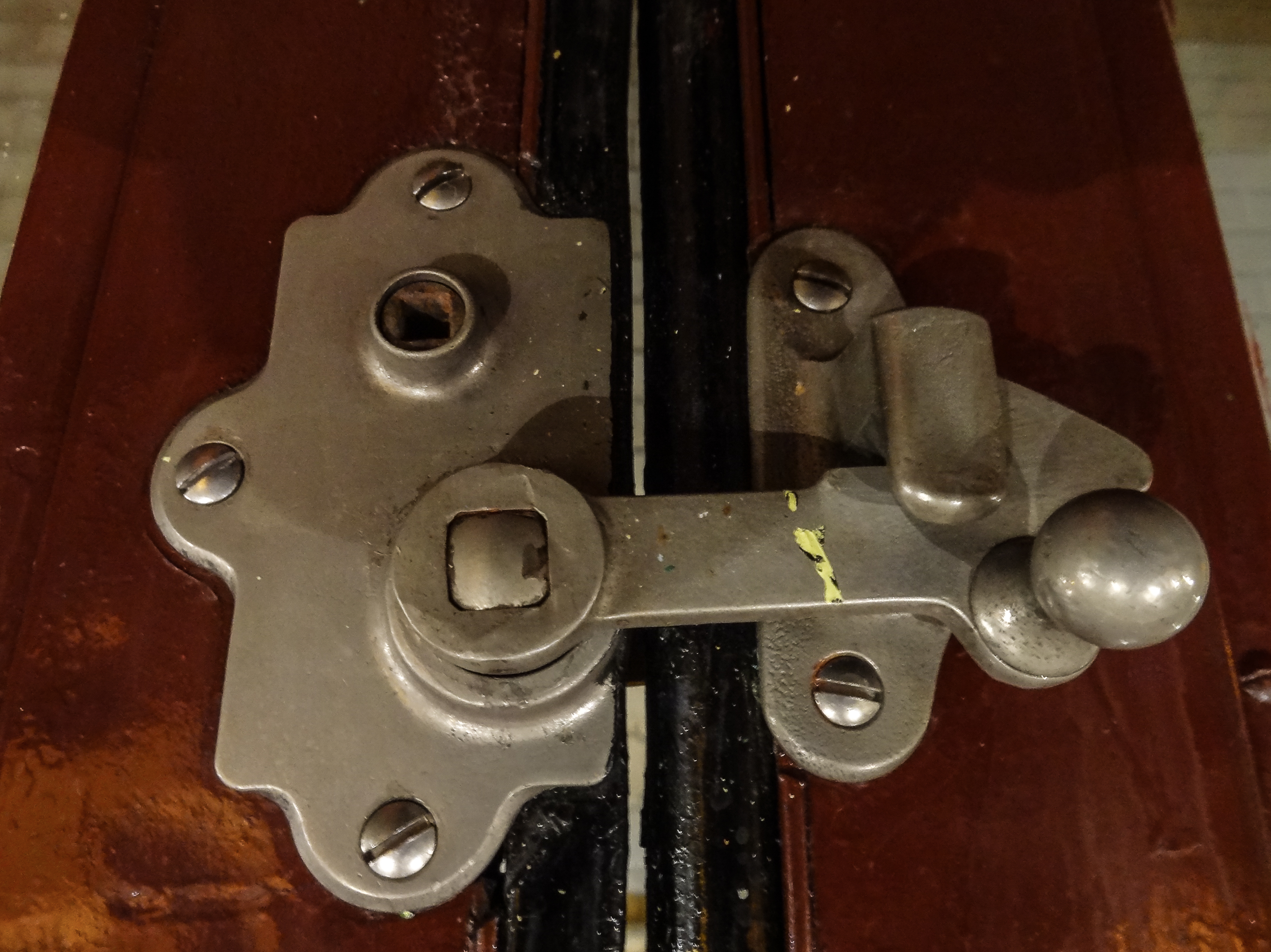 Journées du patrimoine 2012 : loquet de fermeture de la rame Sprague-Thomson. Image tournée à 180° par rapport à l'original.